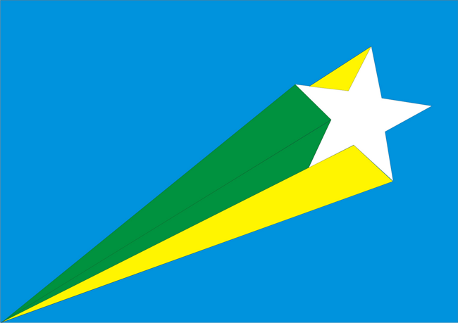 Bandeira de Novo Horizonte do Oeste - RO